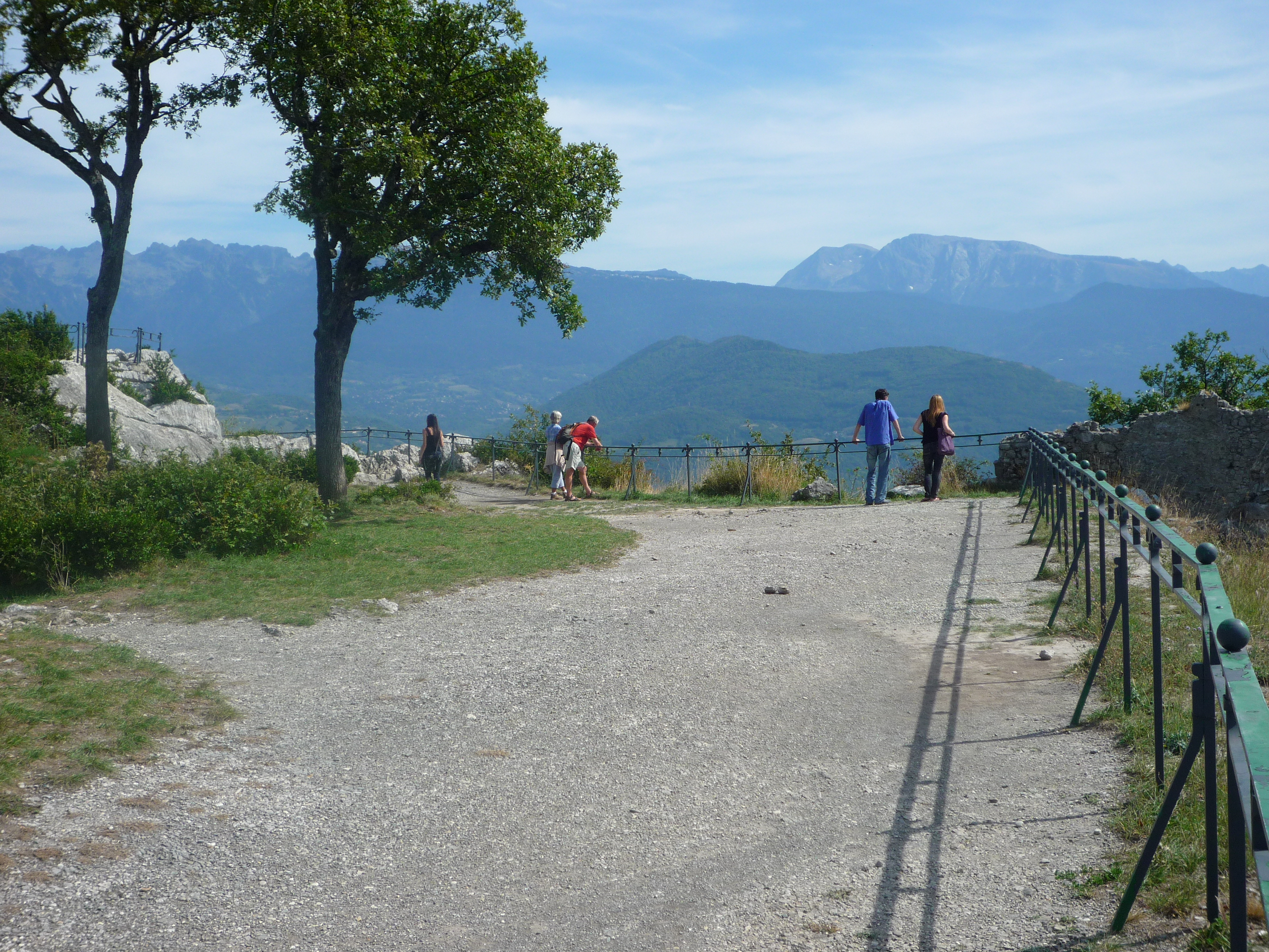 Belvédère touristique du mont Jalla (630 m.) , au-dessus de la Bastille (475 m.) de Grenoble (214 m.).